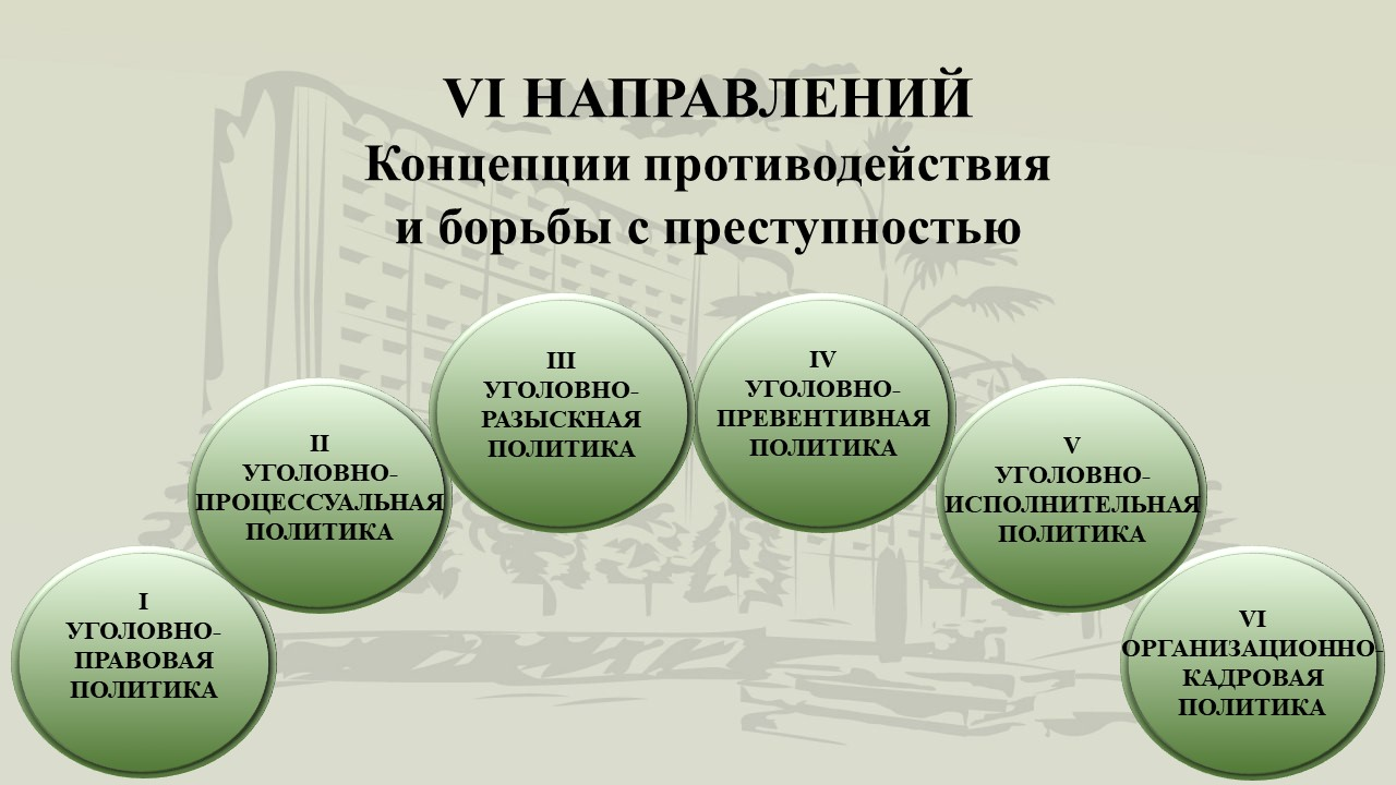 Шесть направлений Концепции противодействия и борьбы с преступностью.